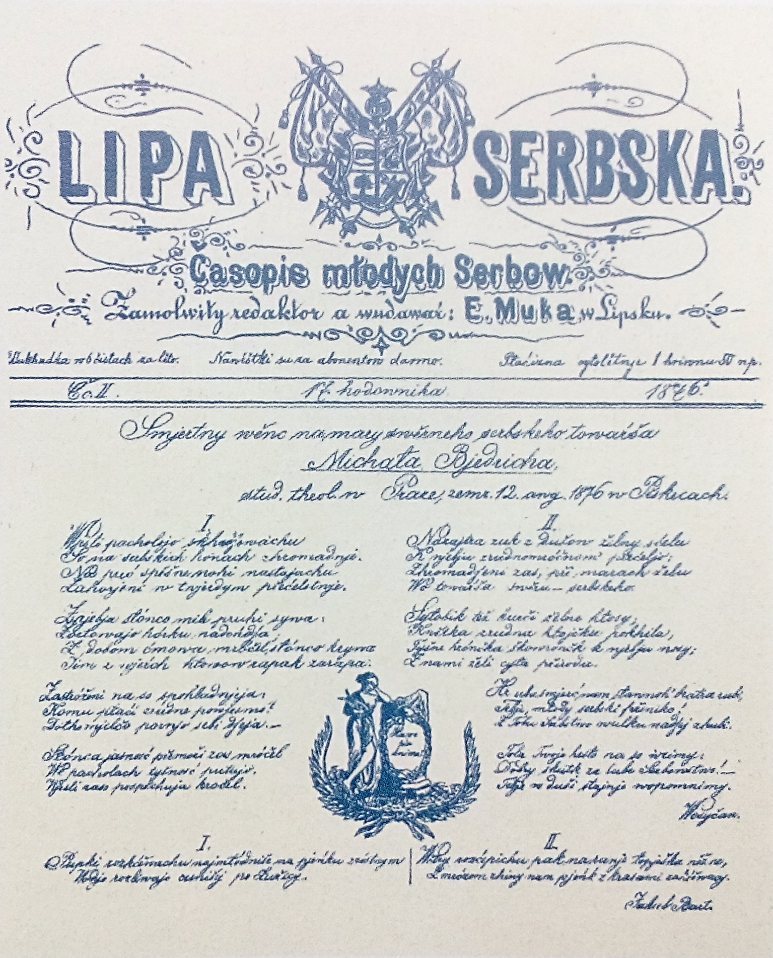 Hornjoserbsce: Preni wobraz hlowy casopisa Lipa Serbska be narysowal A. Muka, z ruku napisal be tute cislo J. A. Holan (1876).